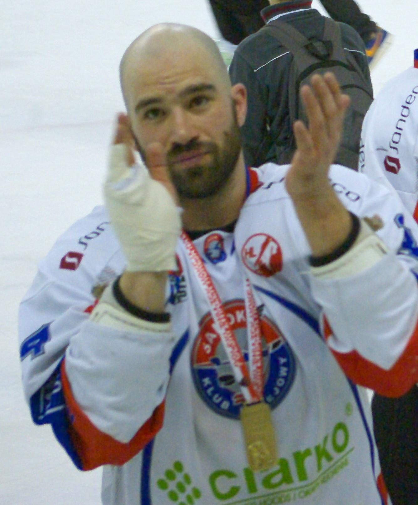 Szósty mecz finałowy o mistrzostwo Polski w hokeju na lodzie w sezonie PHL 2013/2014: Ciarko PBS Bank KH Sanok – GKS Tychy (2:0), 3 kwietnia 2014 w Sanoku (Arena Sanok). Mike Danton